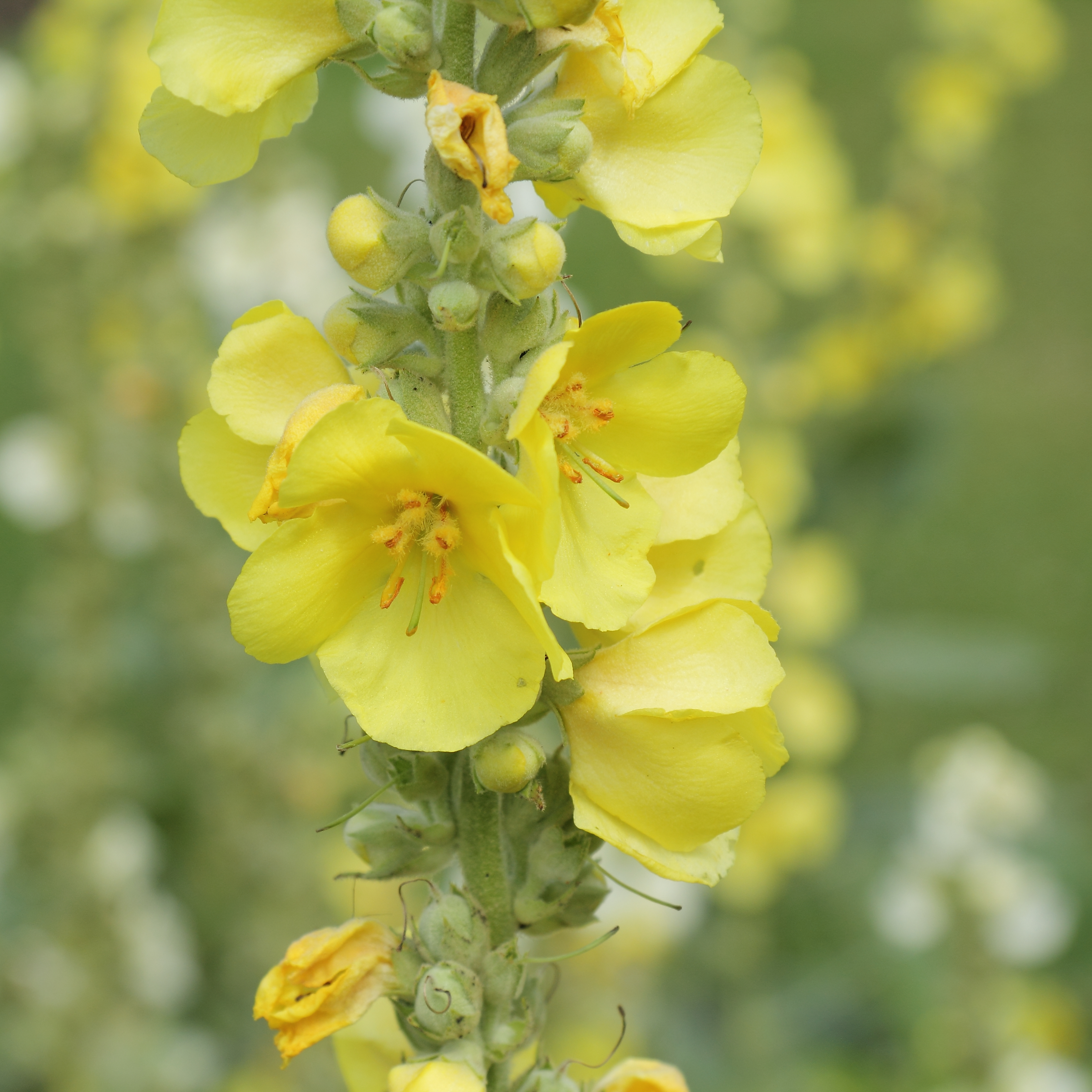 Verbascum phlomoides, identifierad med hjälp av befintlig skylt vid Kew Gardens, London.